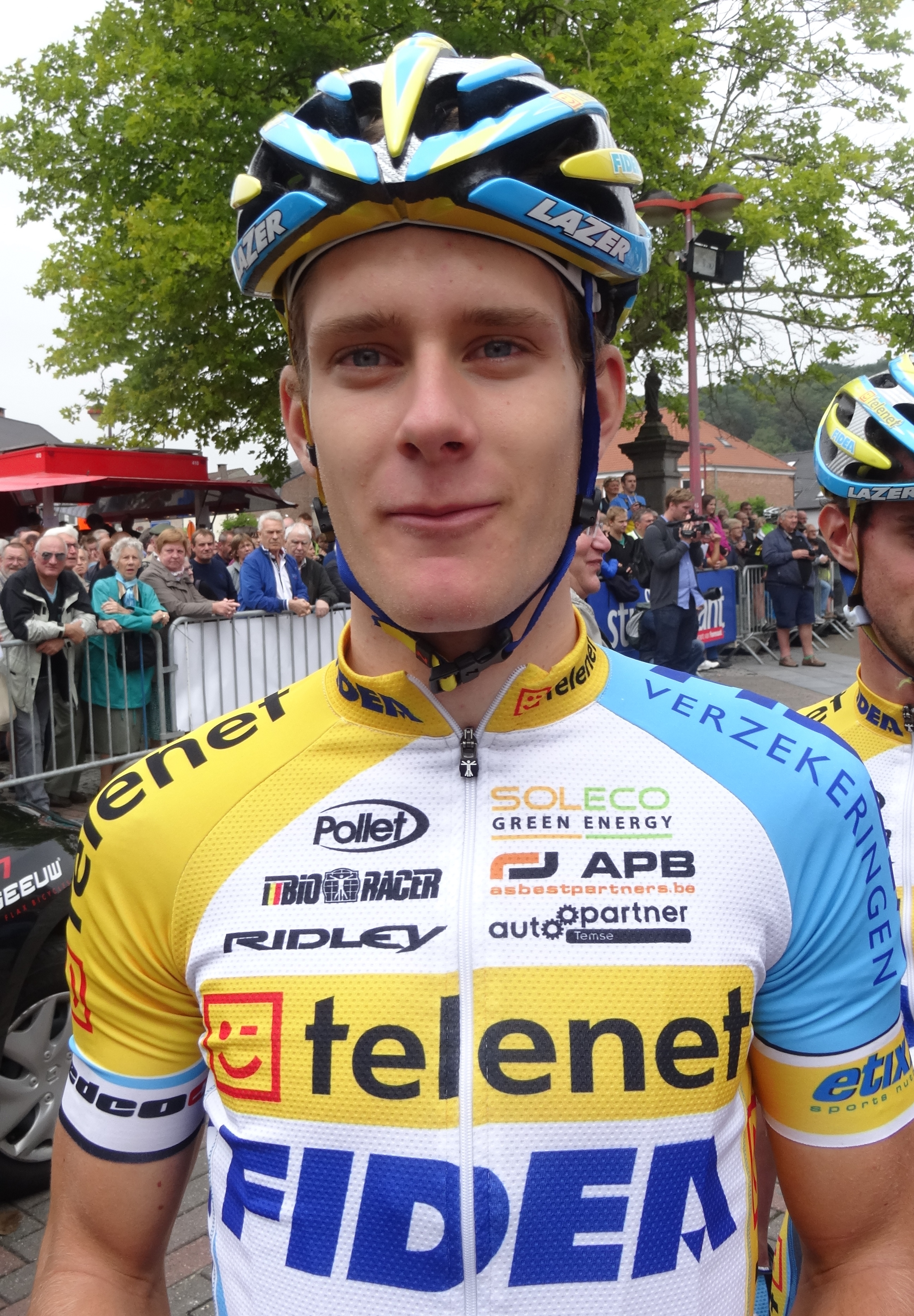 Reportage photographique réalisé le mercredi 27 août à l'occasion du départ de la Druivenkoers Overijse 2014 à Huldenberg, Belgique.